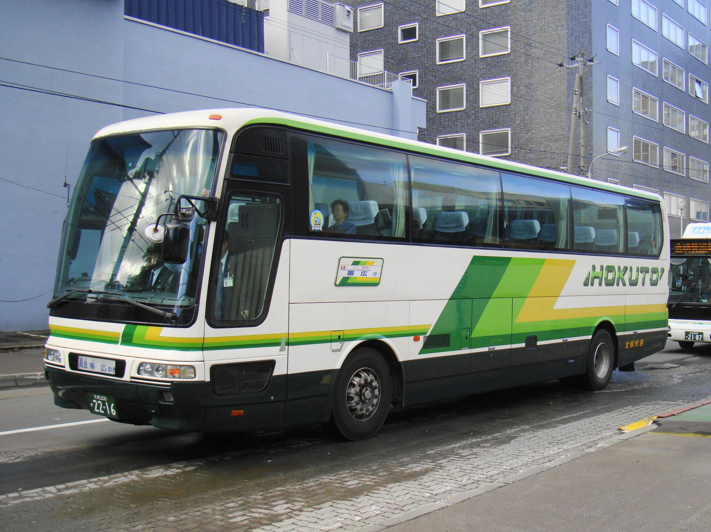 "Potato Liner" Sapporo to Obihiro